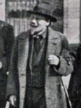 Erich Wichmann. Afkomstig uit: Op de Hoogte (februari 1929): p. 41.